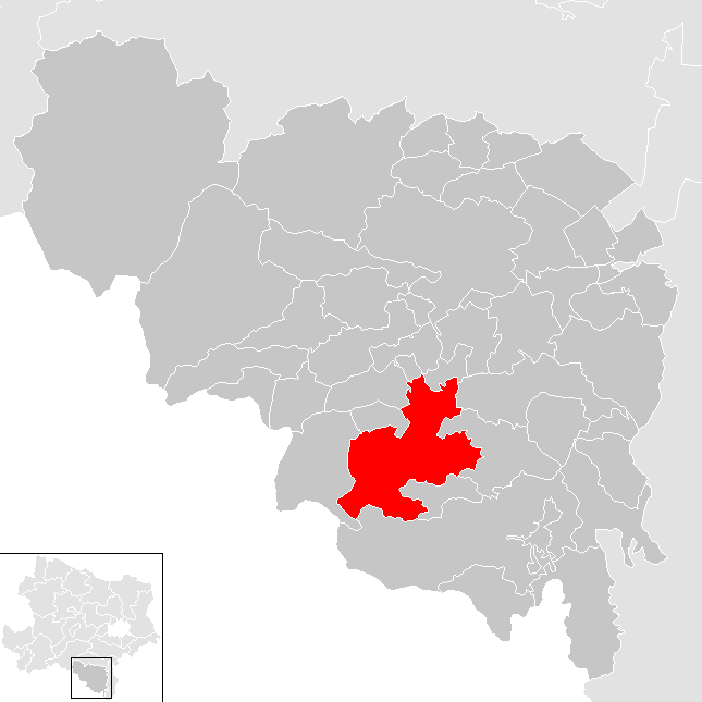 Bezirk Neunkirchen